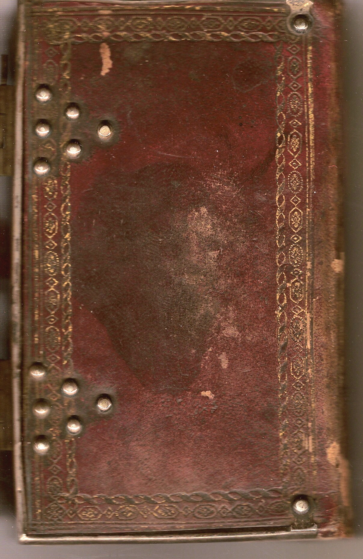 Band van Dobbel Hemels Palm-hof, 1805. Scan van exemplaar uit eigen collectie.